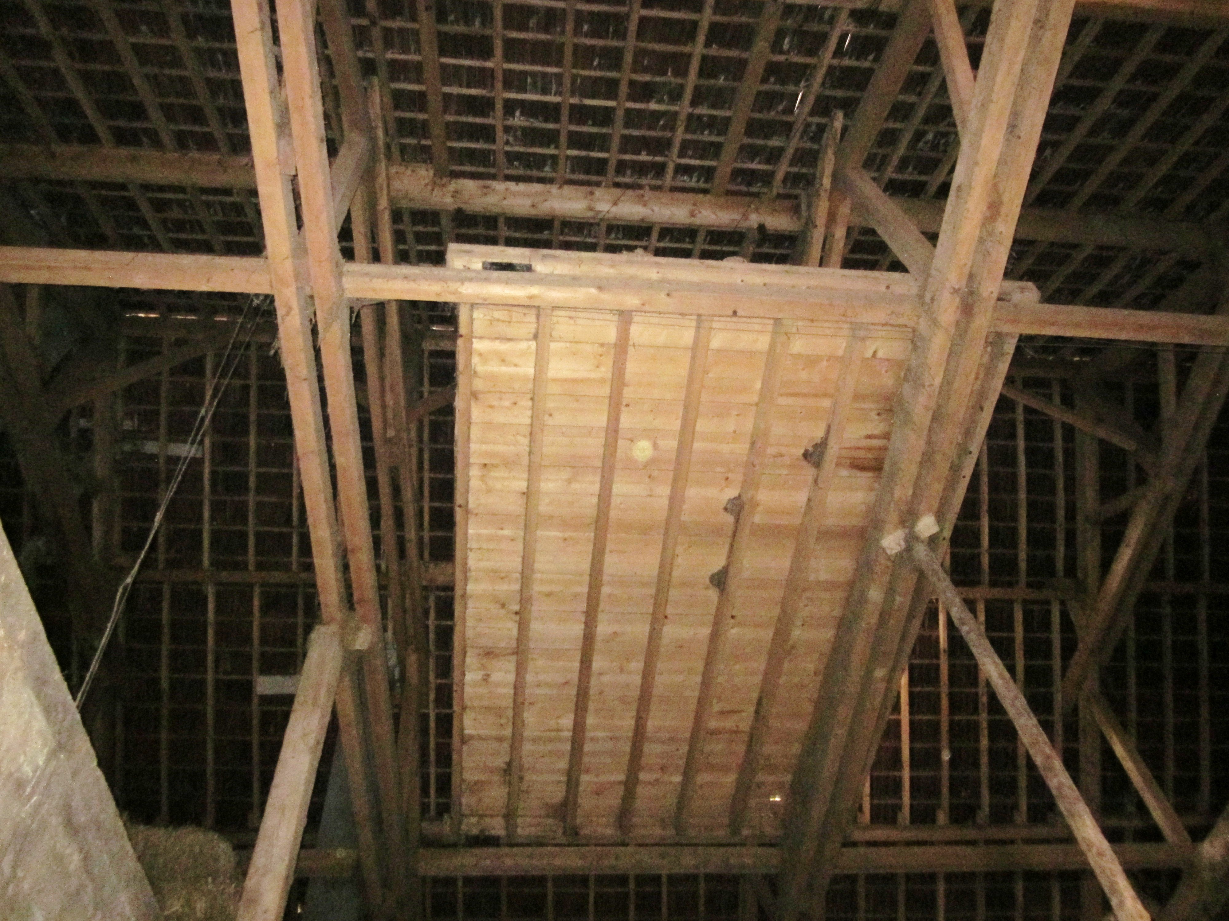 « Wagonnet » : dénomination locale (Jura) de la plateforme sur rail qui, combinée à un treuil extérieur en fonte sur lequel s'enroulent et se déroulent les différents câbles, constitue la « déchargeuse ». Cette plateforme destinée à recevoir les chargement de fourrage était installée sous la charpente des granges dans les fermes du Jura.